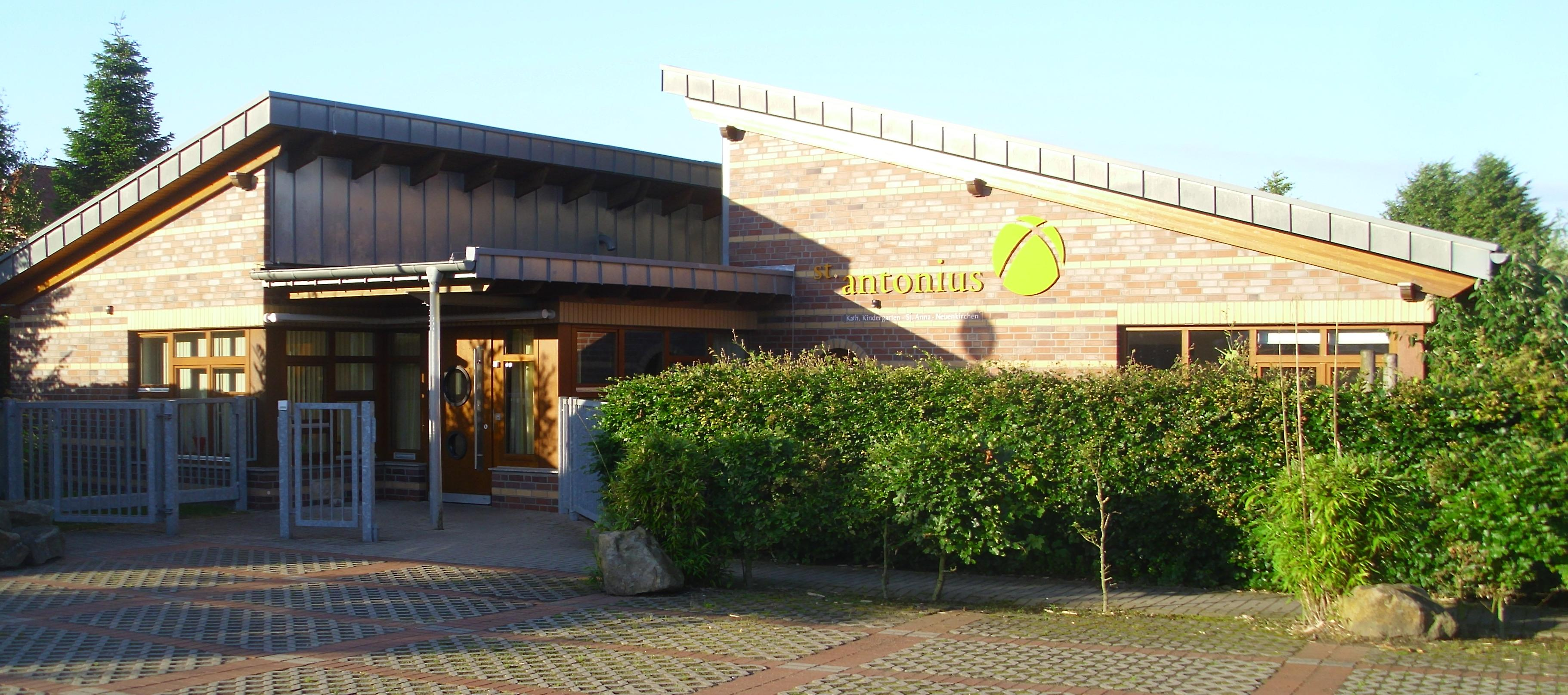 Kindertagesstätte St. Antonius in Neuenkirchen (Kreis Steinfurt). Der Kindergarten besteht seit 1929 und war der erste Kindergarten in Neuenkirhen. Er befand sich zunächst im Antonius-Stift an der Rheiner Straße. Seit dem 10. Januar 1997 befindet sich die Kita, in dem hier abgebildeten Neubau, an der Arnold-Janssen-Strasse 34. Textquelle: [1]